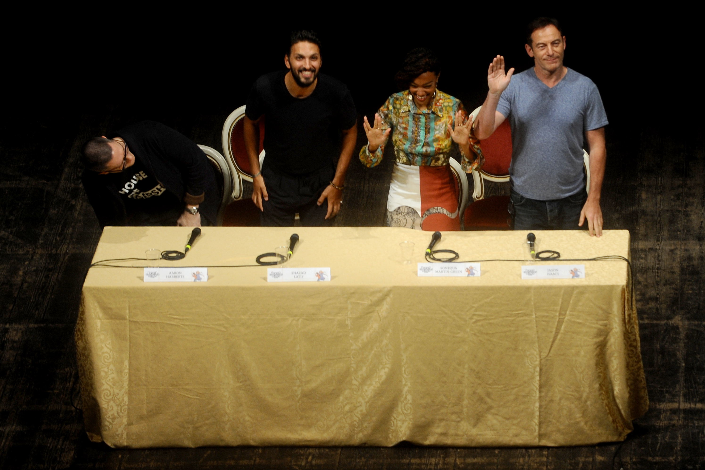 Aaron Roberts, Shazad Latif, Sonequa Martin-Green e Jason Isaacs. Teatro del Giglio. Lucca.